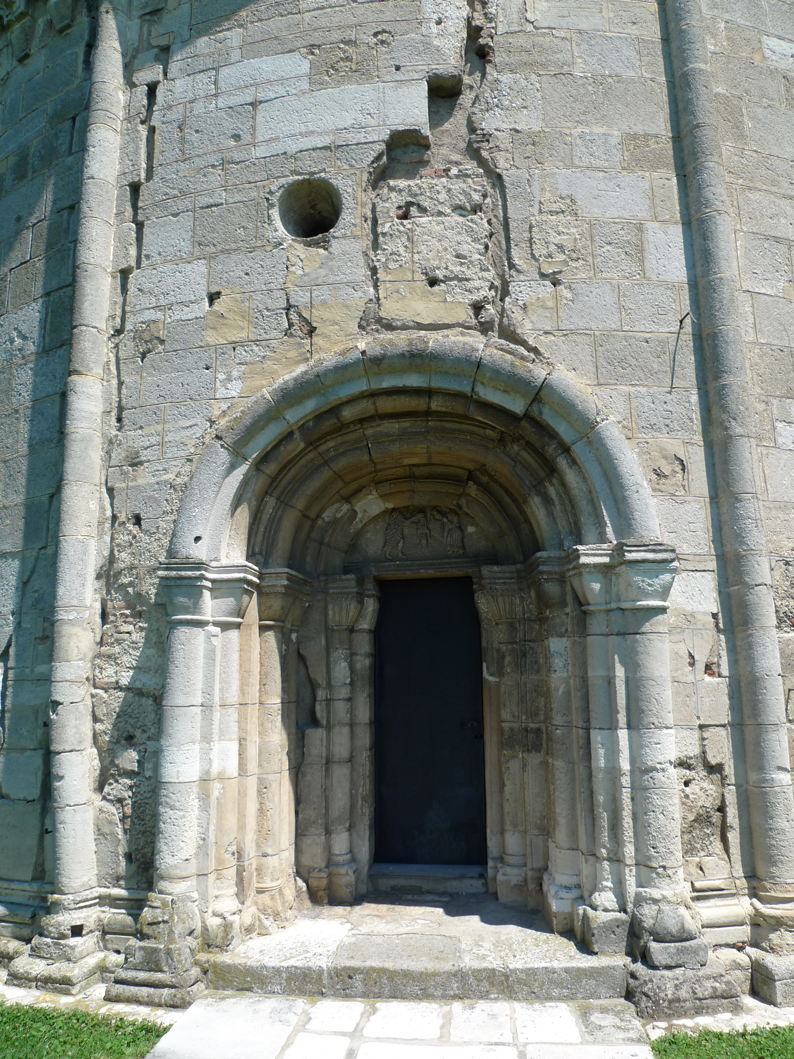 Petronell Carnuntum Rundkapelle